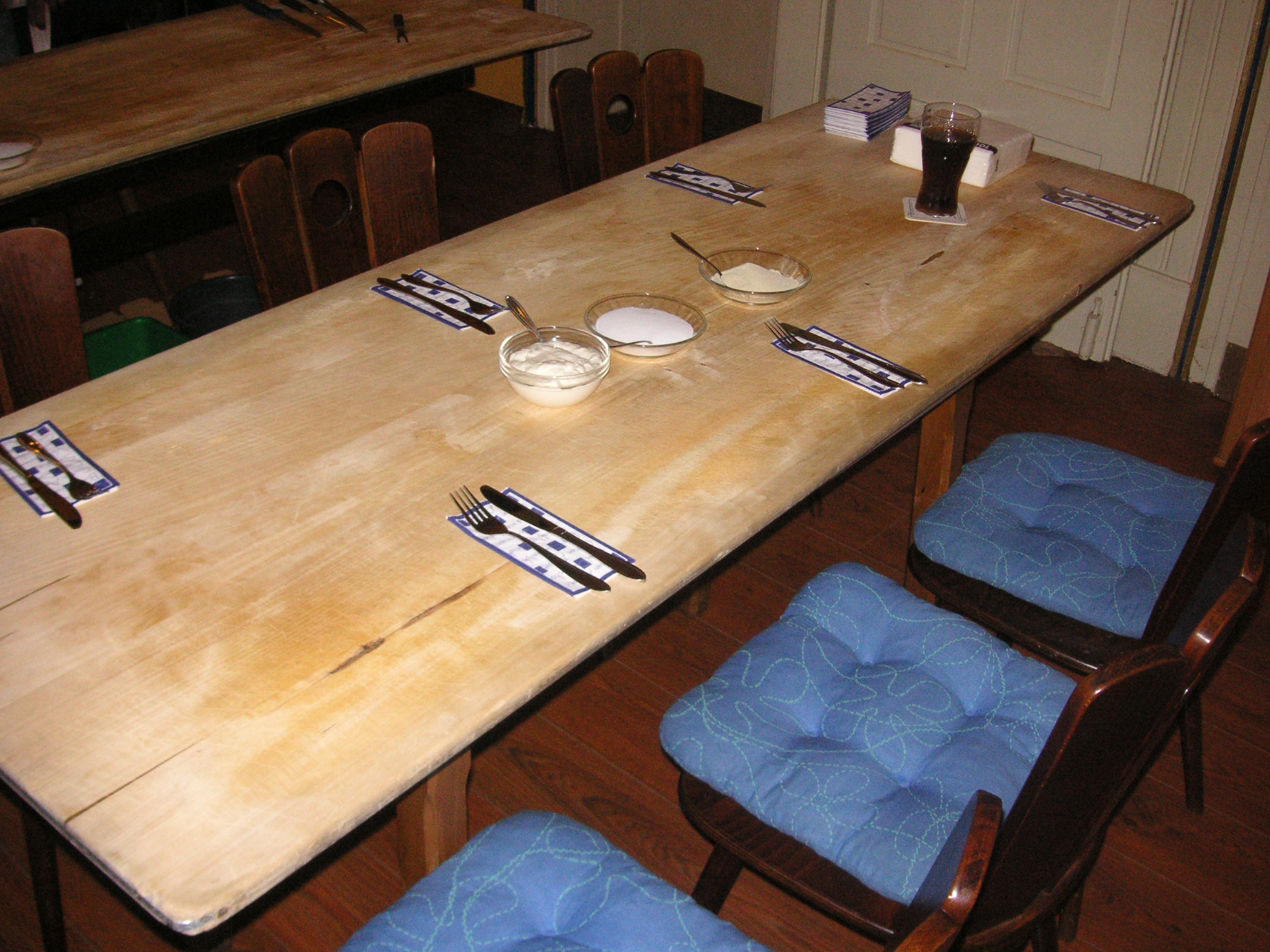 Bild einer "Original Schweinfurter Schlachtschüssel". Das Bild zeigt den Tisch mit einem Holzbrett, von dem "vom Brett" gegessen wird.